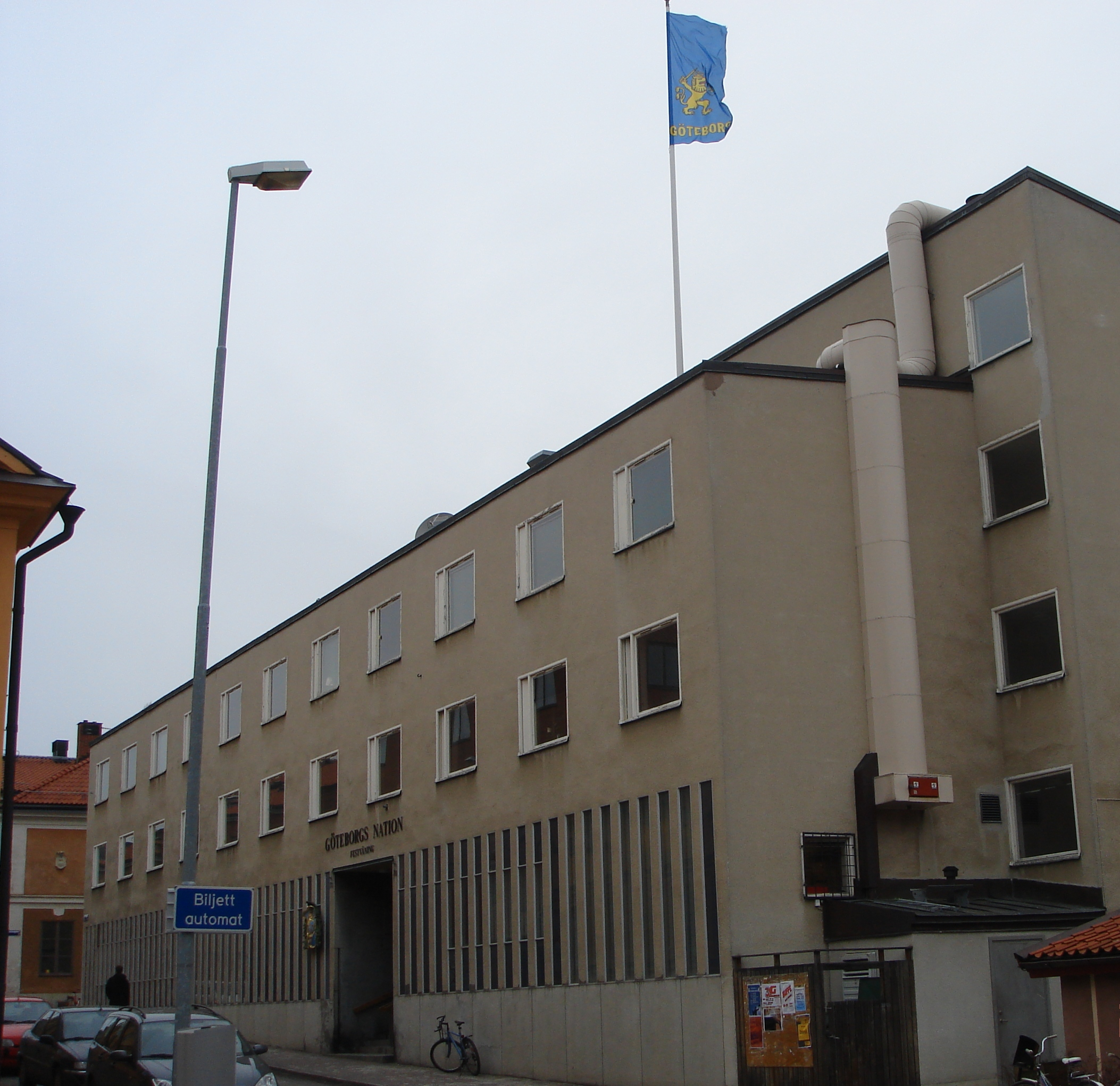 Göteborgs nation, Uppsala, Sweden